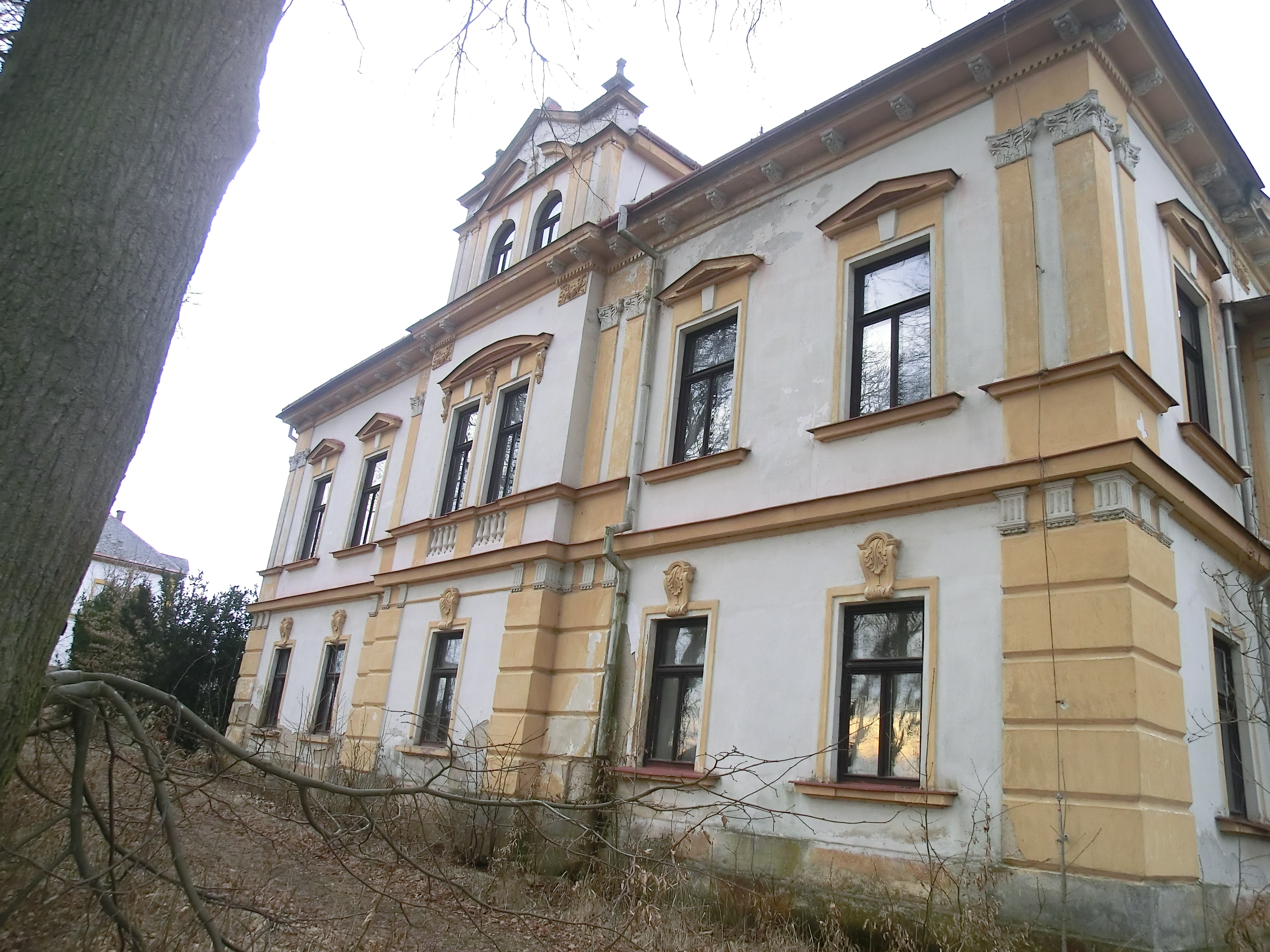 Zámek ve Studenci byl v 80. letech přestavěn na školicí a rekreační středisko závodů Chemopetrol Litvínov, od roku 2002 je uzavřen a rychle chátrá.